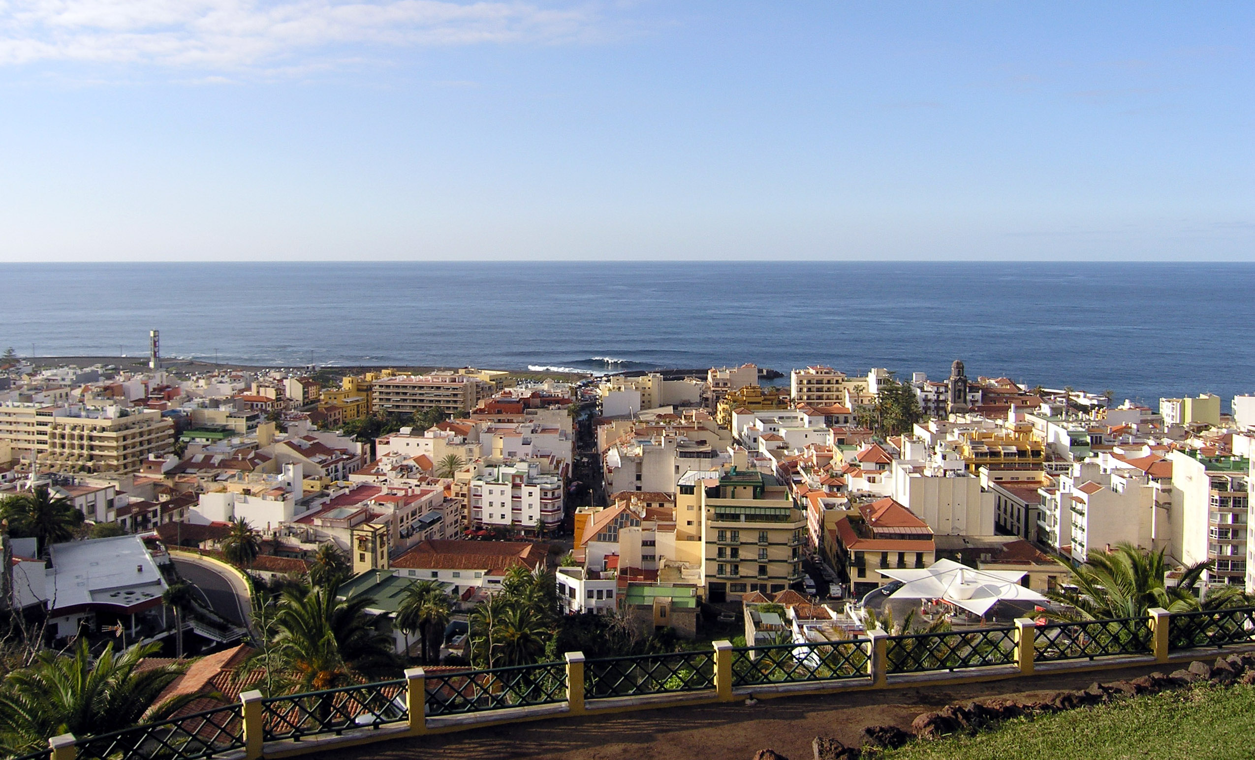 view on Puerto de la Cruz, Tenerife